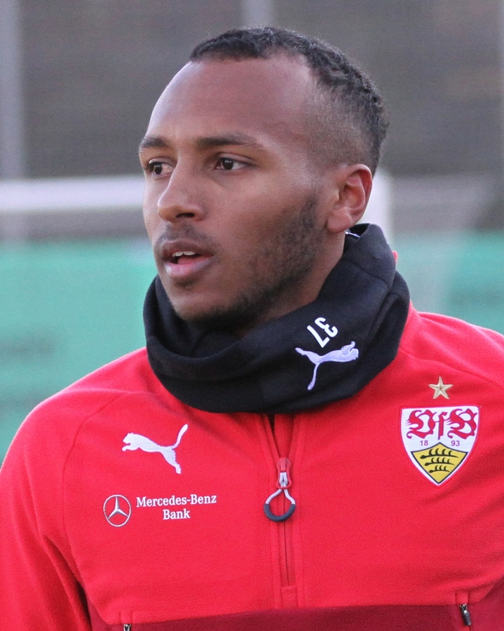 Julian Green bei seinem ersten VfB-Training. Aufgenommen von